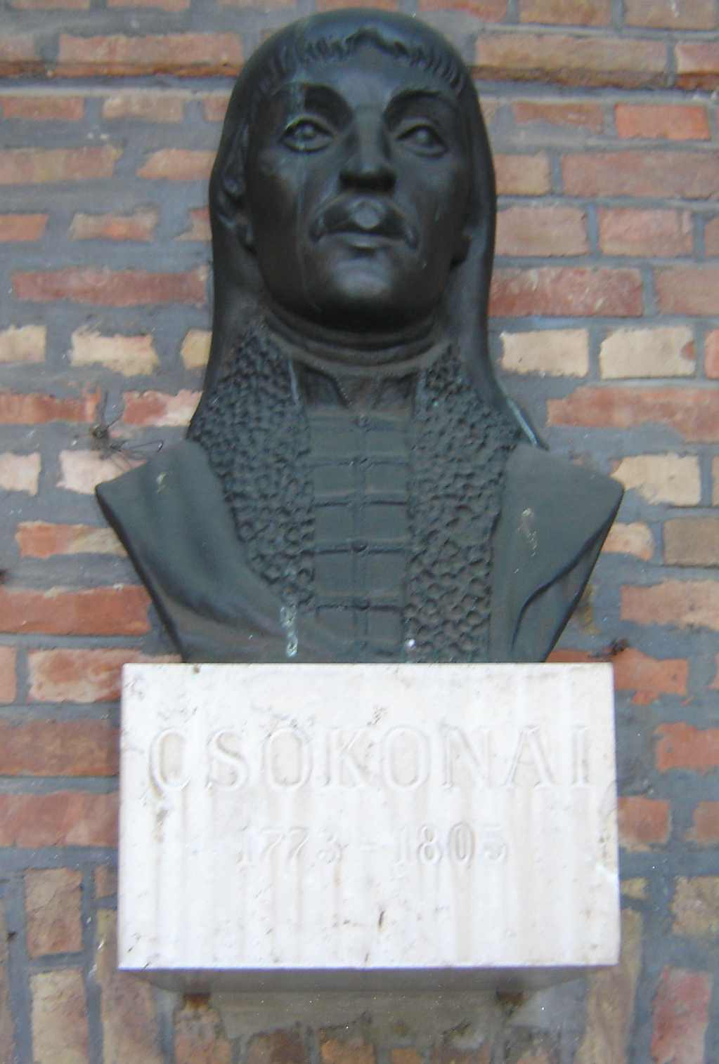 Csokonai Vitéz Mihály (1773-1805) portré szobra a szegedi Nemzeti Emlékcsarnokban a Dóm téren az árkádok keleti oldalán. A szobor Szandai Sándor alkotása